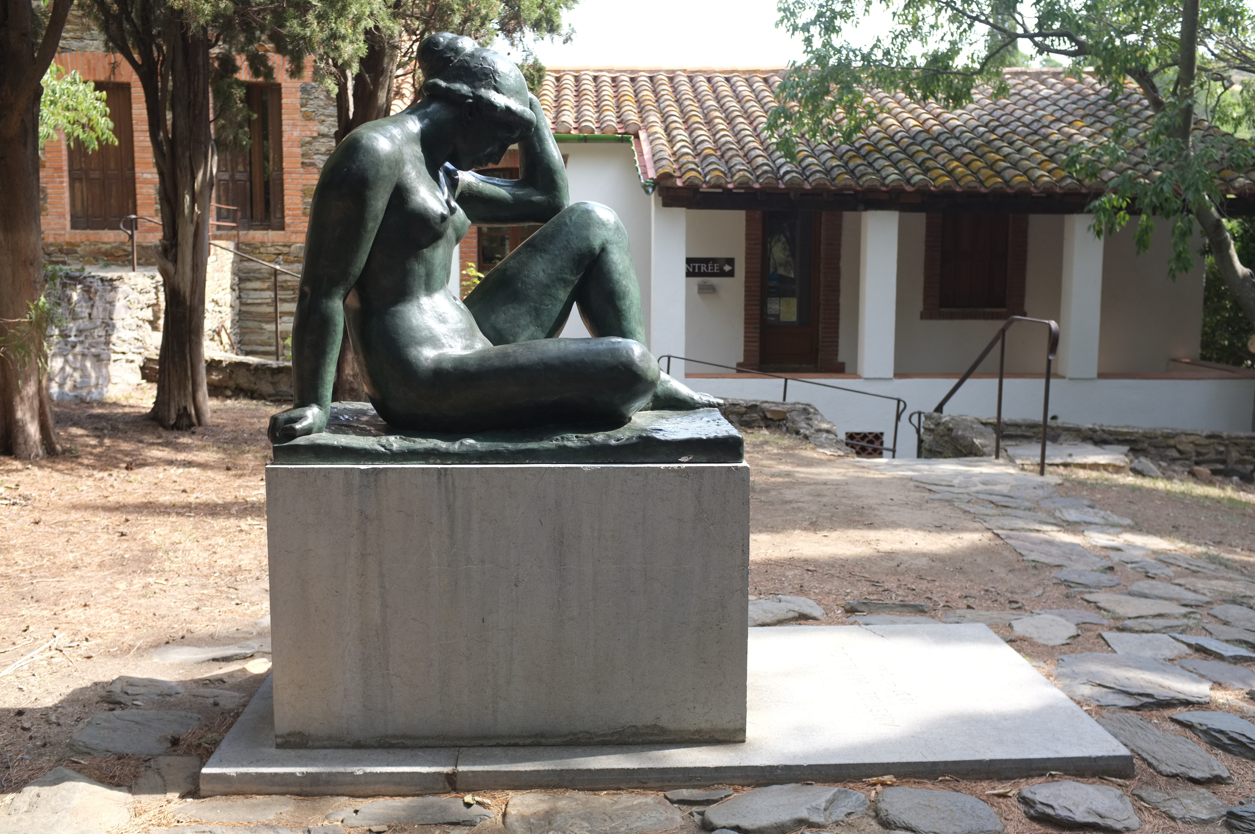 La Méditerranée, 1905, bronze, vue de profil jardin de la métairie de Banyuls-sur-Mer